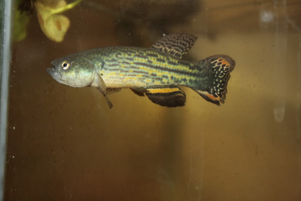 Neofundulus paraguayensis "Ogun Marcelino AAK 12-03"